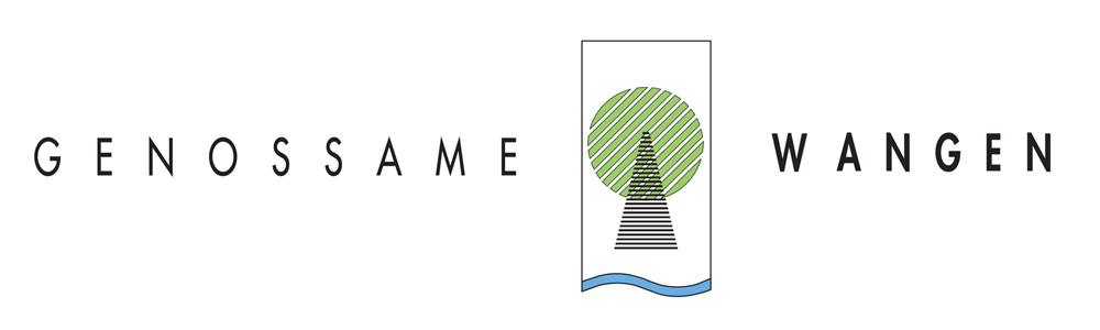 Das Offizielle Logo der Genossame-Wangen